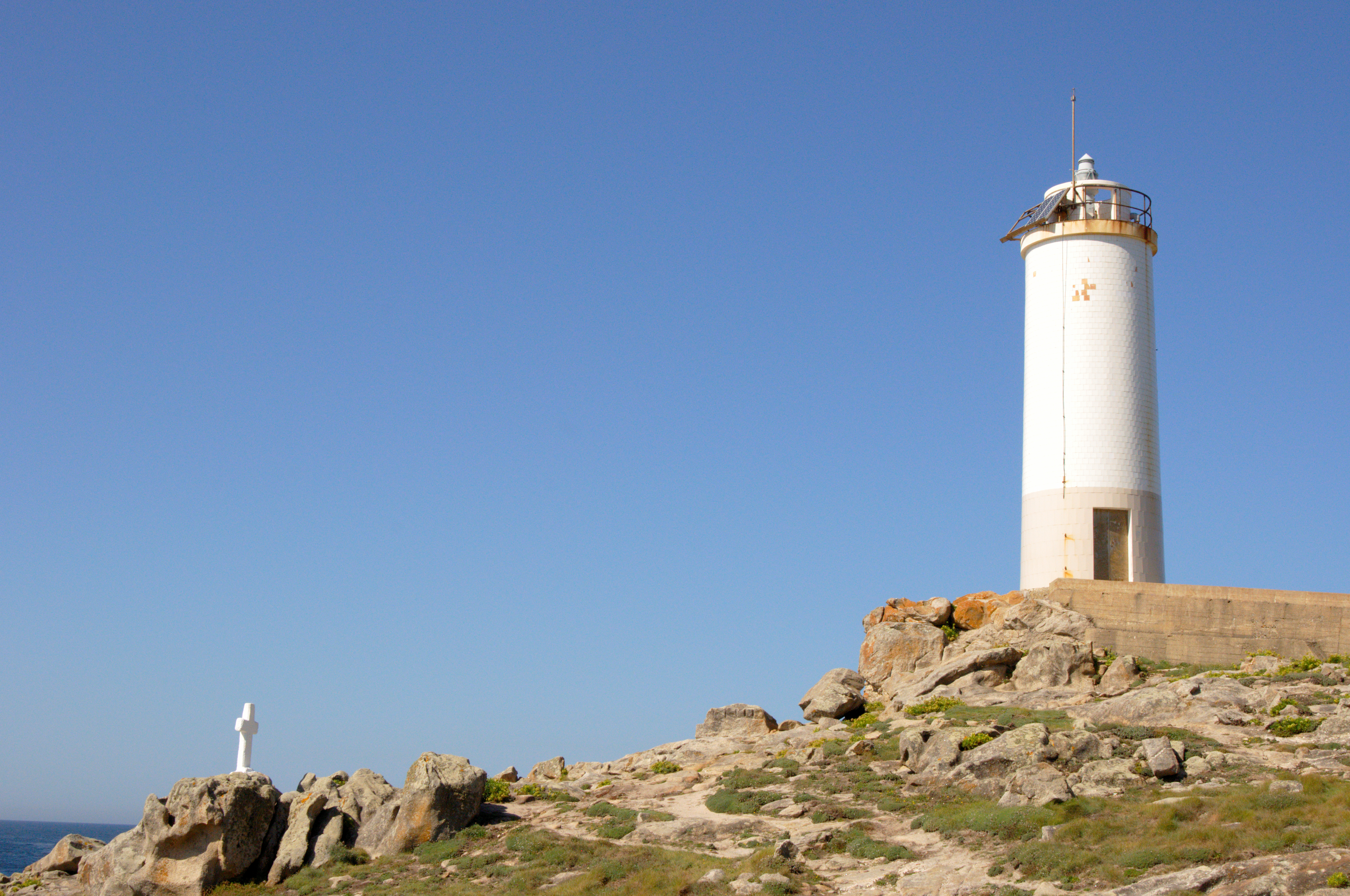 Cabo Roncudo, Galicia